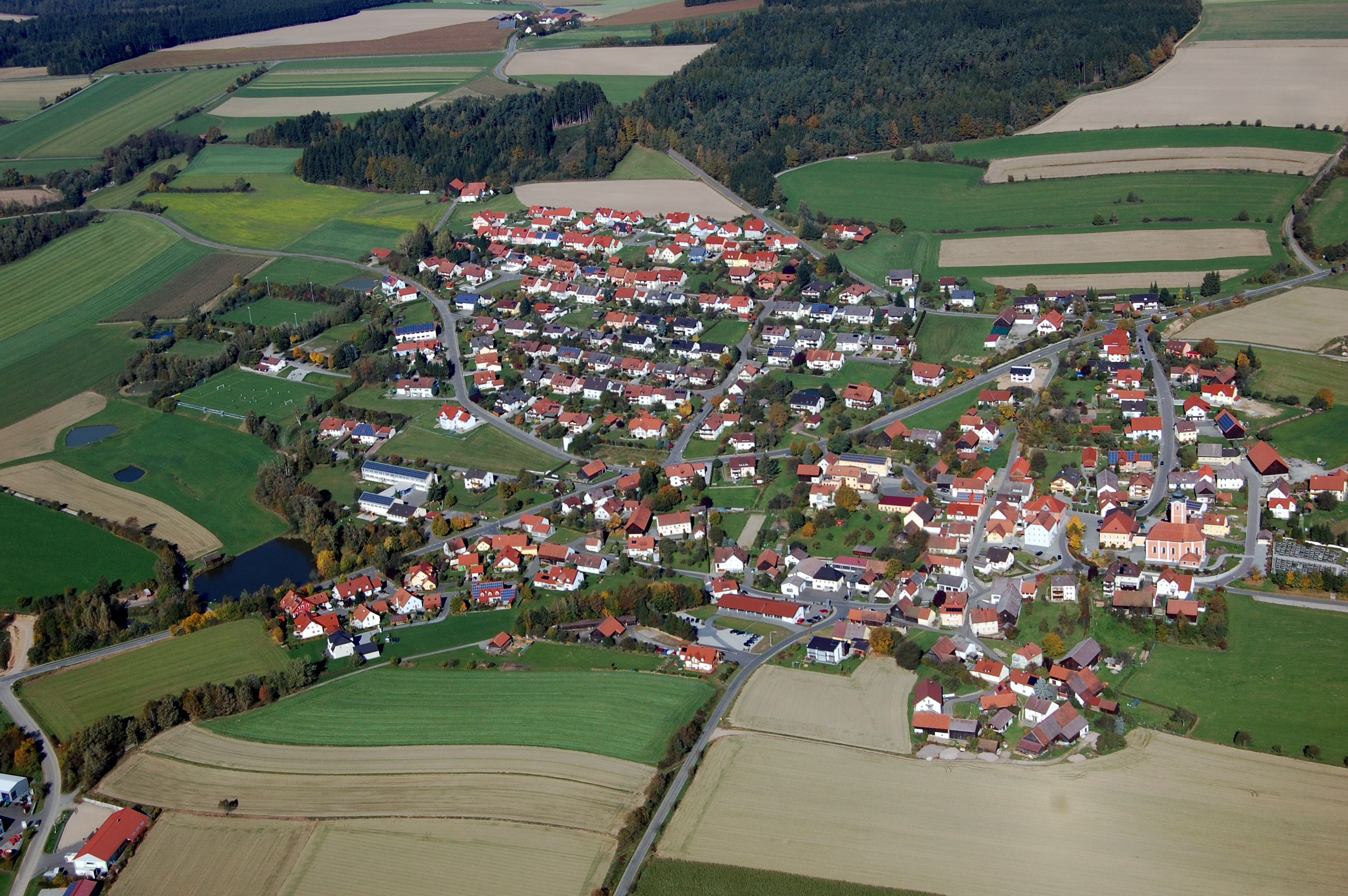 Luftaufnahme der Ortschaft Dieterskirchen